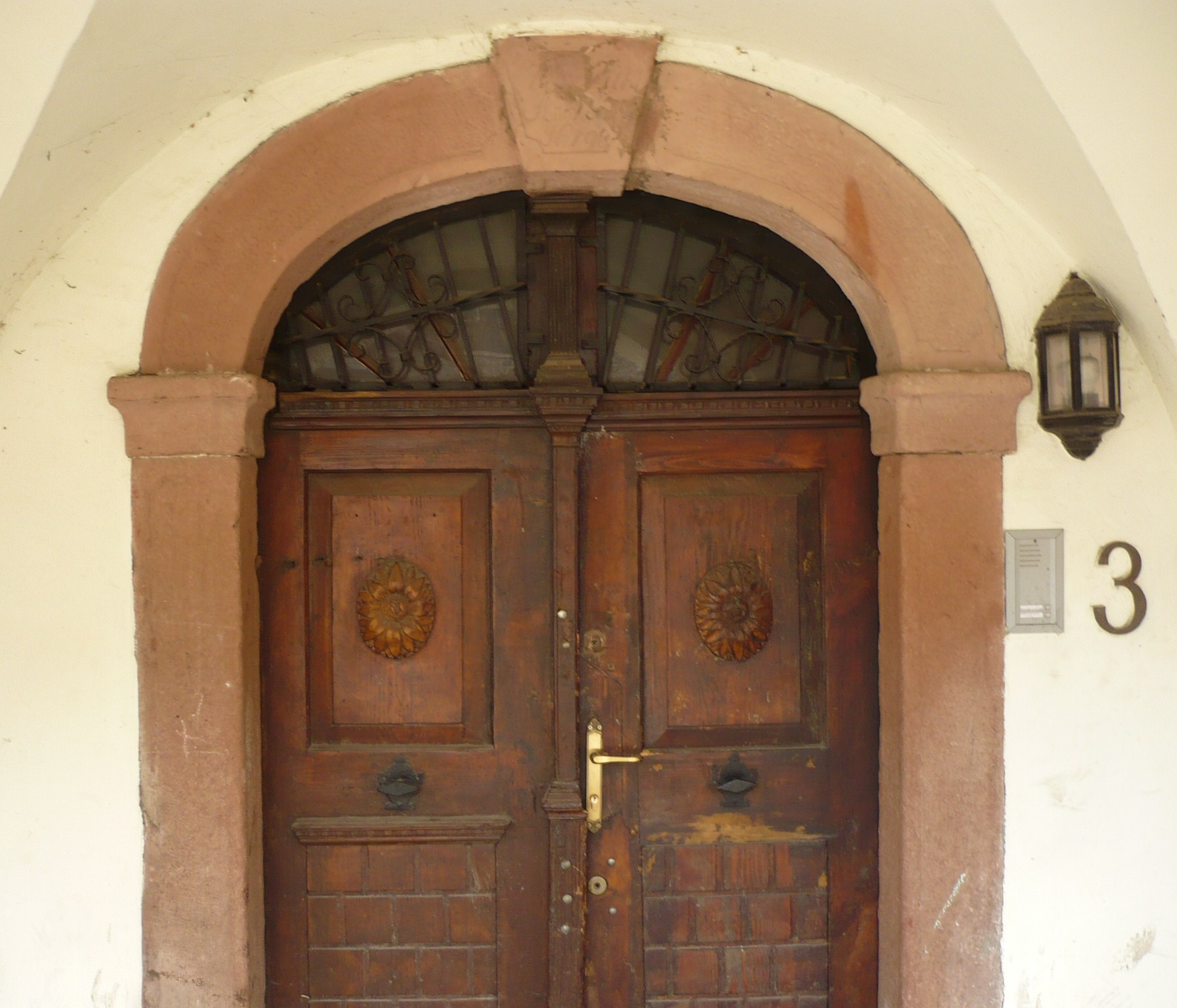 Nowa Ruda, ul. Nadrzeczna 3 - brama domu tkaczy, XVIII/XIX w., przebud. w XX w. (zabytek nr A/942/1566 z 16.03.1966)